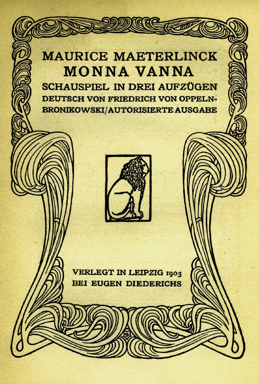 Titelseite der deutschen Erstausgabe von Monna Vanna von Maurice Maeterlinck (1903)